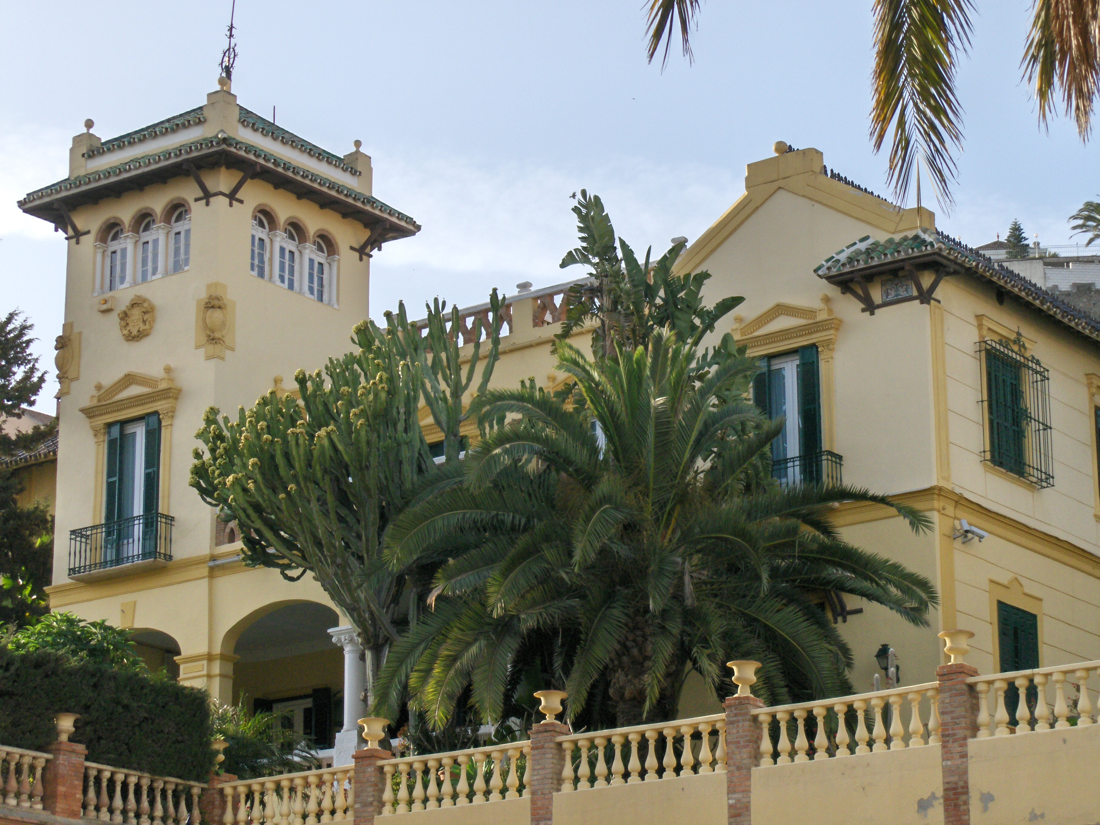 Villa La Bouganvillea, Málaga, España.